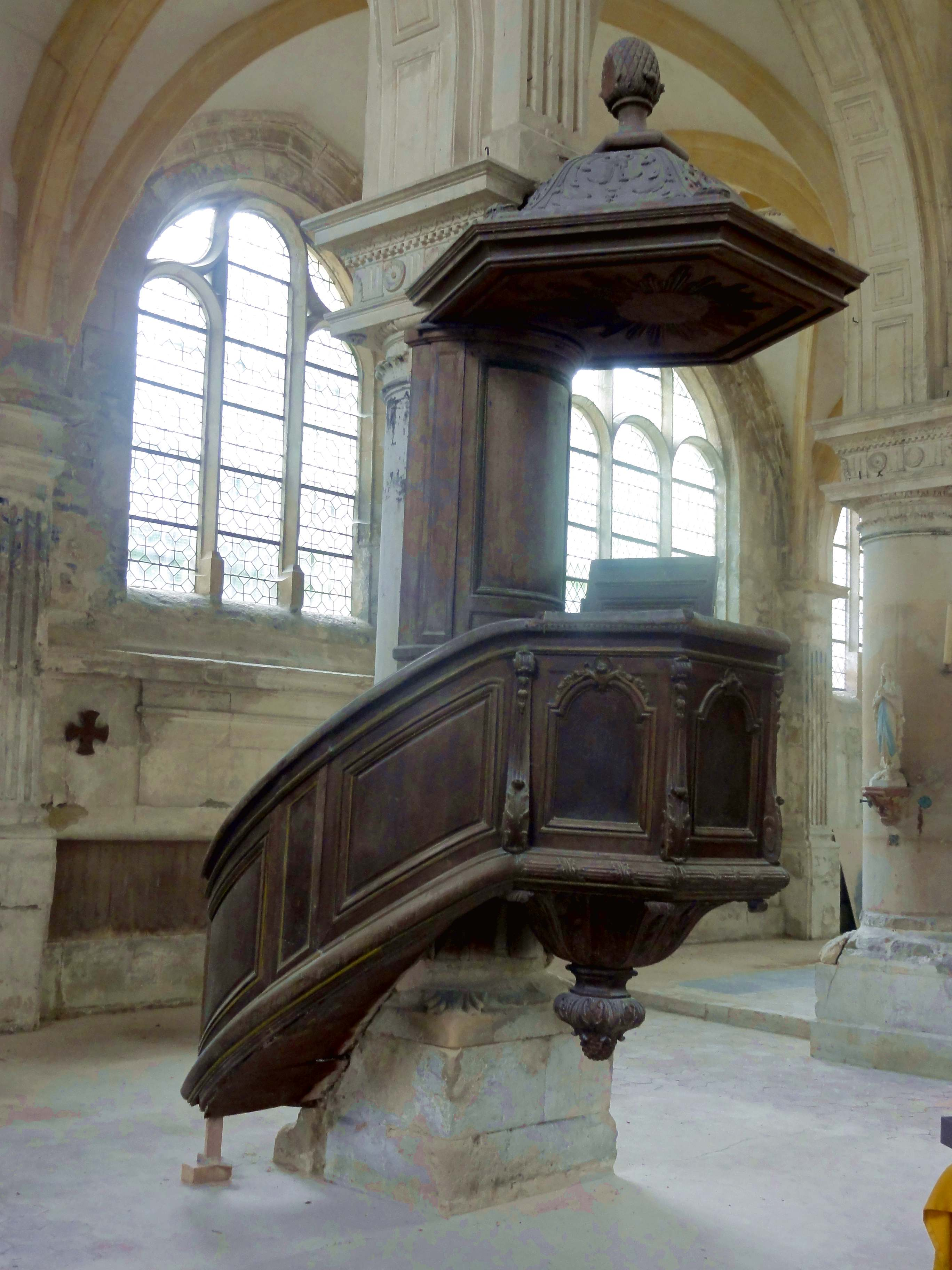 Chaire à prêcher.